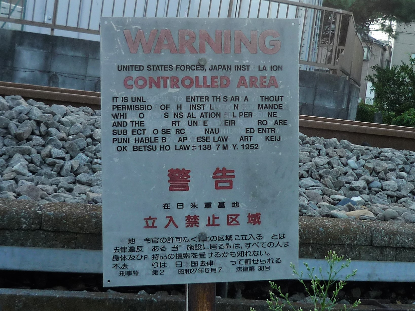 横田基地専用線の警告看板